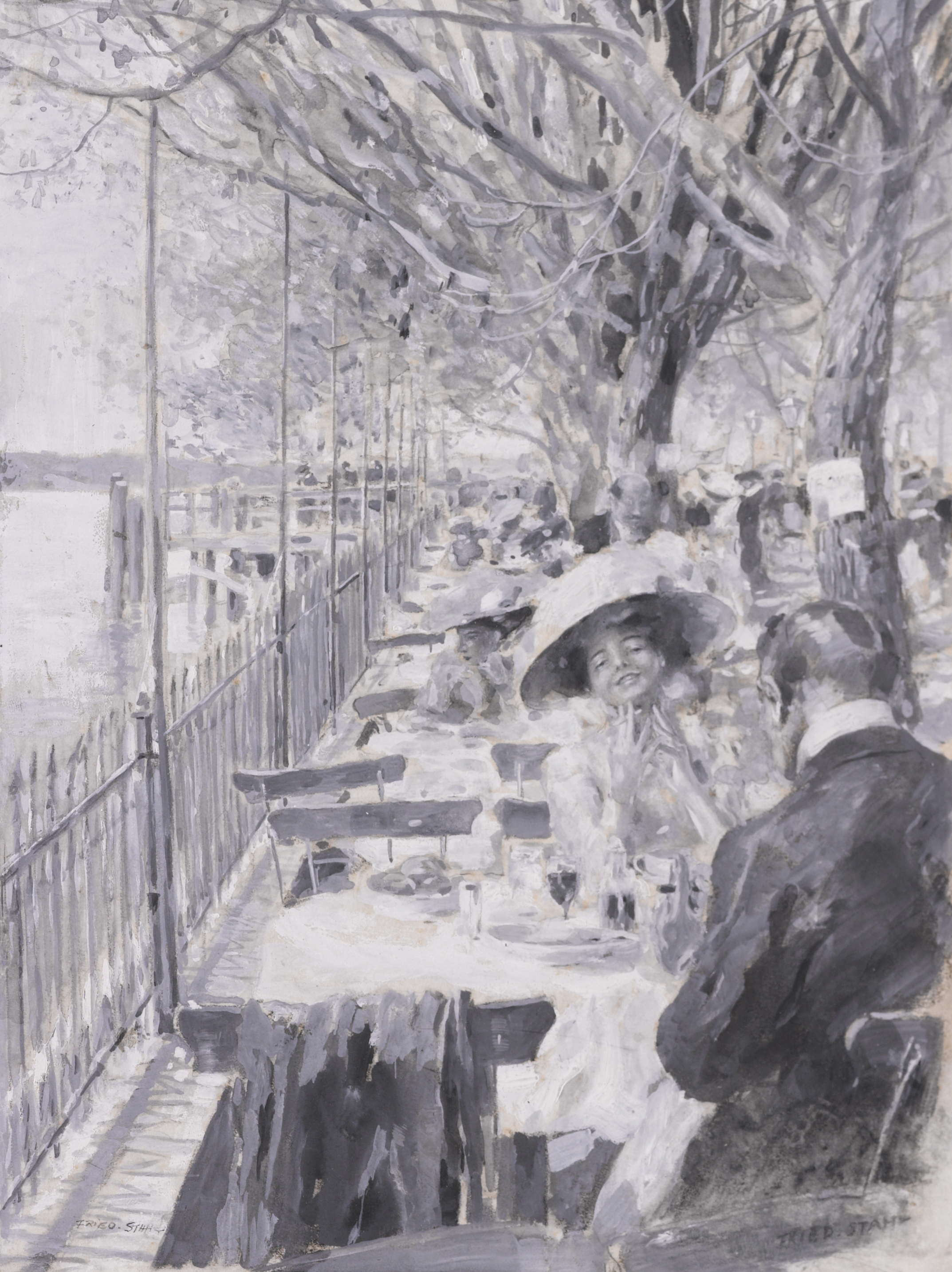 Friedrich Stahl: Ein Pessimist. Gouache auf Papier, 25,3 x 19,1 cm, signiert unten rechts und links: FRIED. STAHL